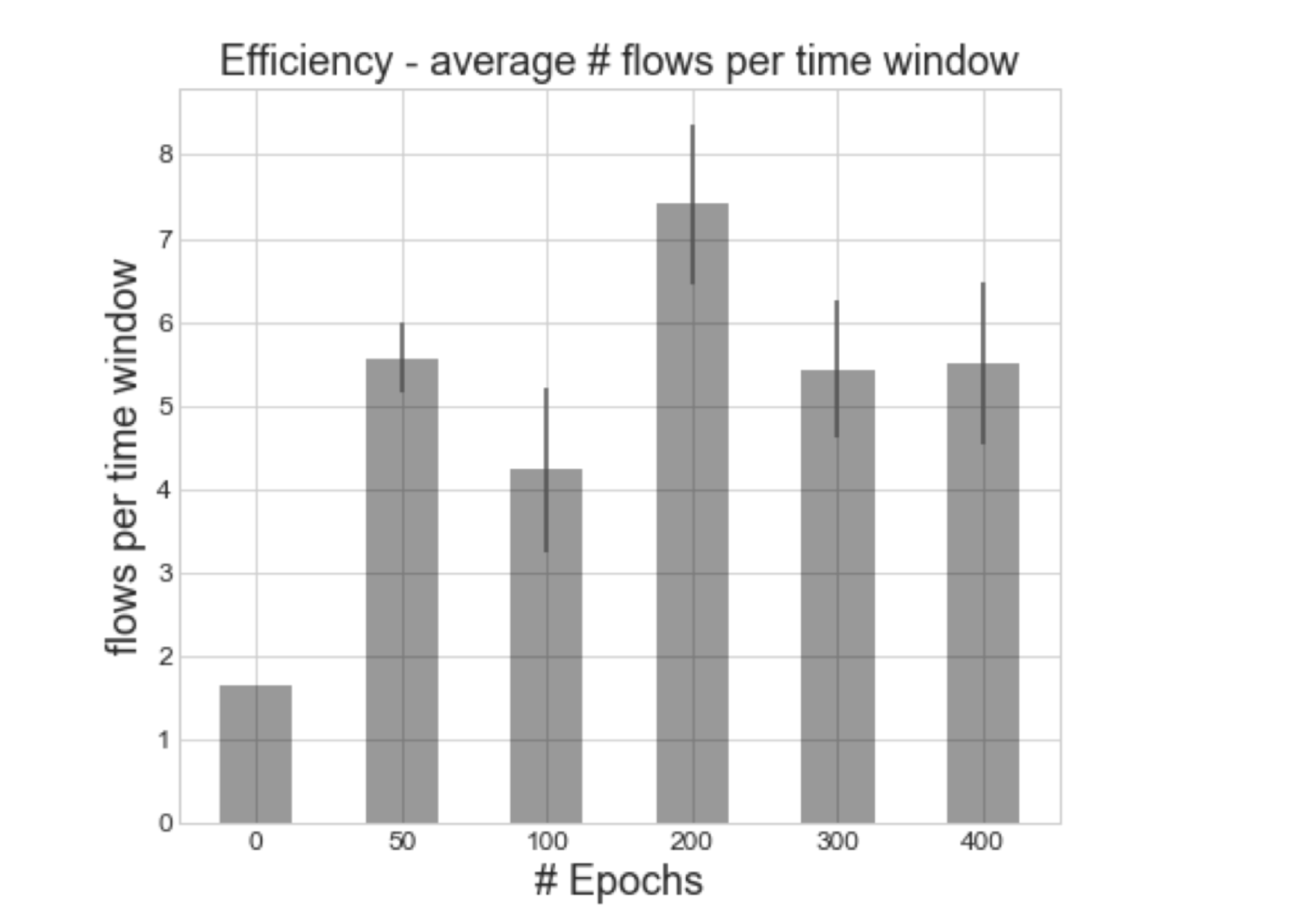 Ось X представляет количество тренировочных эпох, а ось Y - среднее количество потоков за промежуток времени в пять минут. Количество потоков за интервал времени для каждой из предварительно обученных моделей.